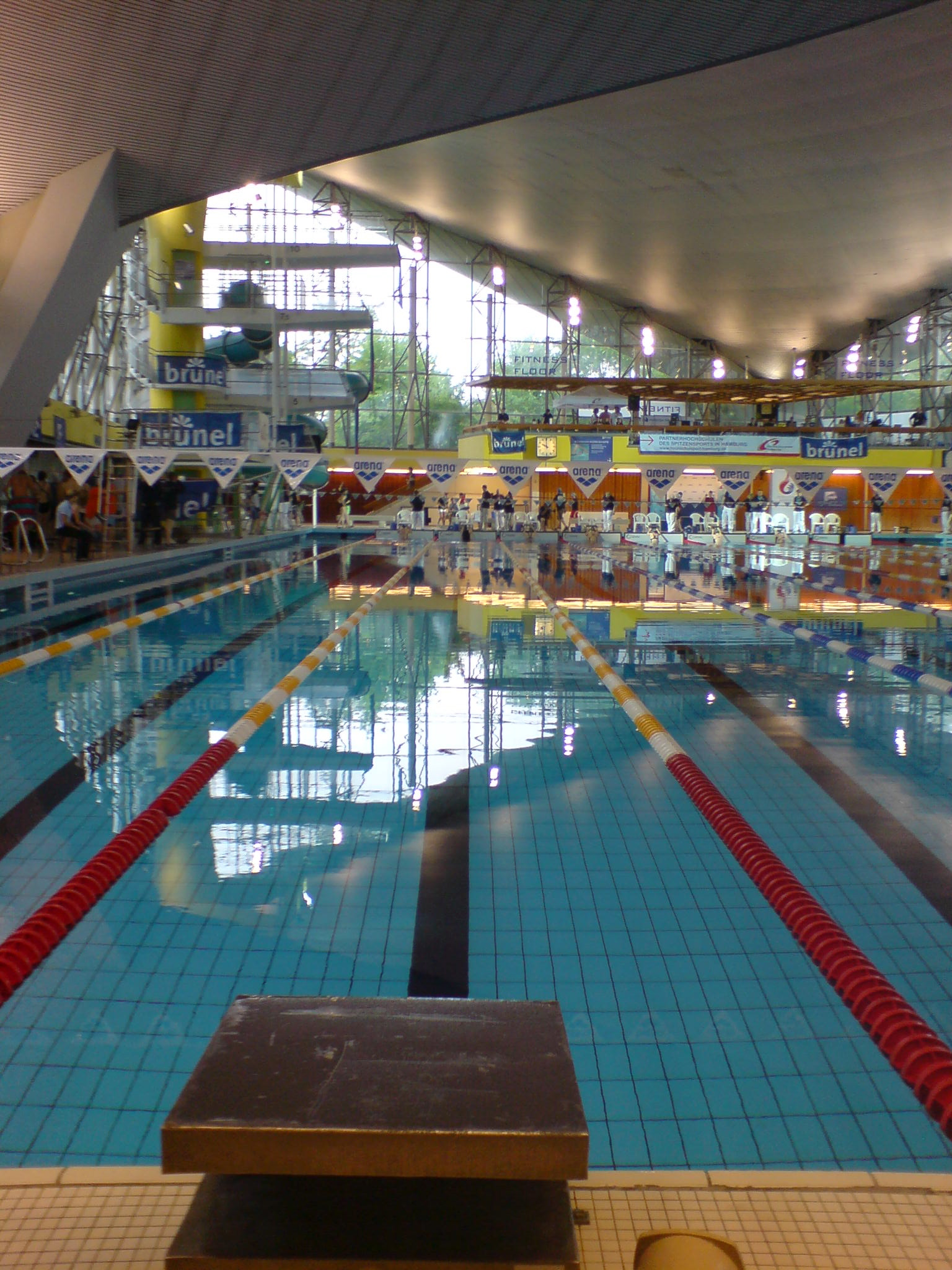 Alsterschwimmhalle Hamburg. Aufgenommen während der Deutschen Hochschulmeisterschaften Schwimmen 2007, 11.-13. Mai.